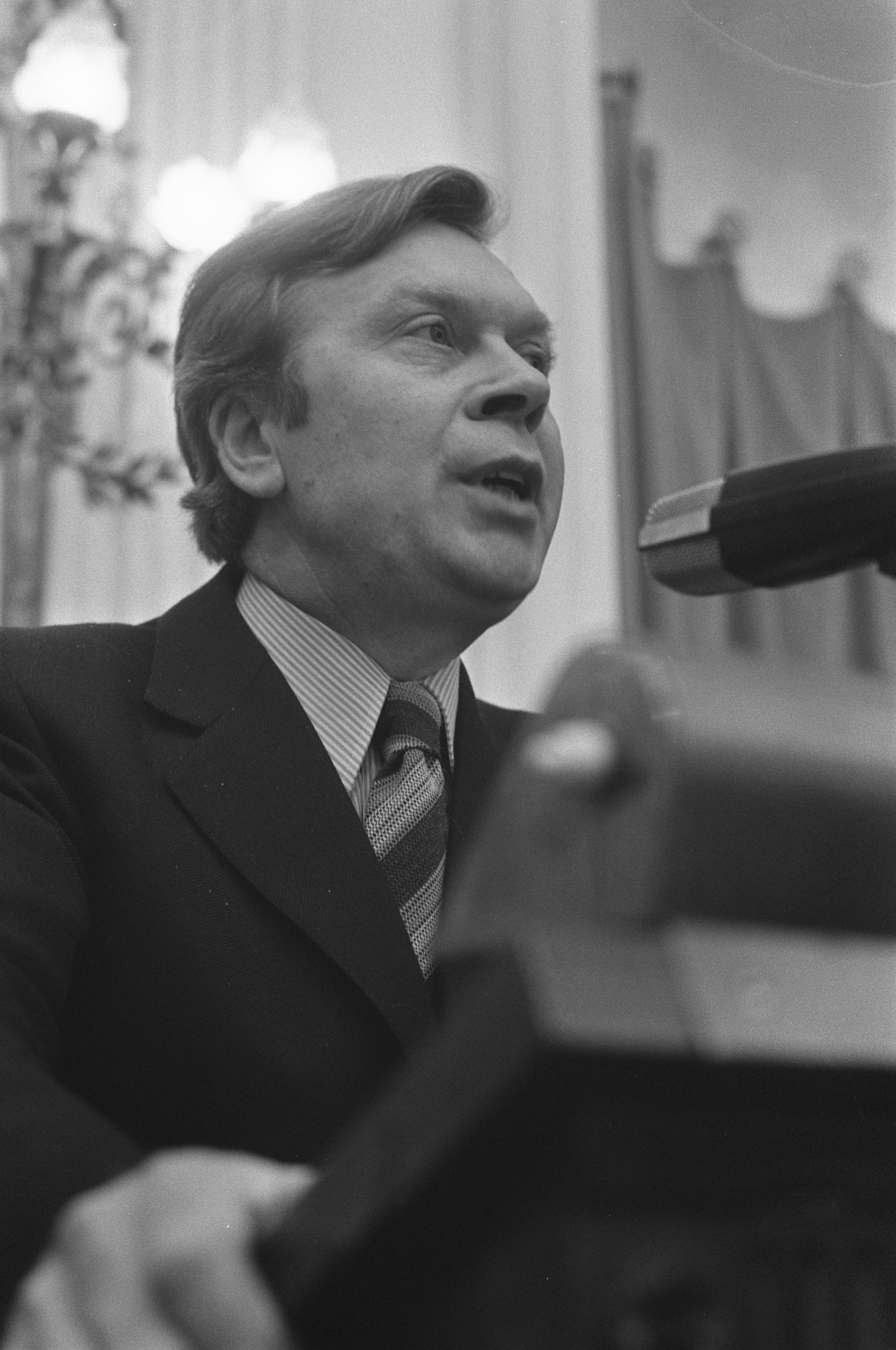 Collectie / Archief : Fotocollectie Anefo Reportage / Serie : [ onbekend ] Beschrijving : Tweede Kamerlid Wieldraaijer (PvdA) vraagt interpellatie aan over het ontslag bij AKZO tijdens het kamerdebat Datum : 11 april 1972 Locatie : Den Haag, Zuid-Holland Trefwoorden : parlementaire debatten, parlementariërs, politiek, portretten Persoonsnaam : Wieldraayer, E.R. Instellingsnaam : PvdA, Tweede Kamer Fotograaf : Verhoeff, Bert / Anefo Auteursrechthebbende : Nationaal Archief Materiaalsoort : Negatief (zwart/wit) Nummer archiefinventaris : bekijk toegang 2.24.01.05 Bestanddeelnummer : 925-5195